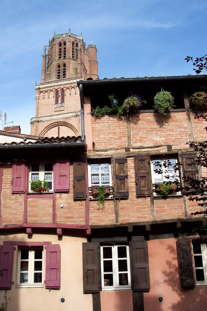 France, Tarn, Albi : La brique rouge albigeoise.